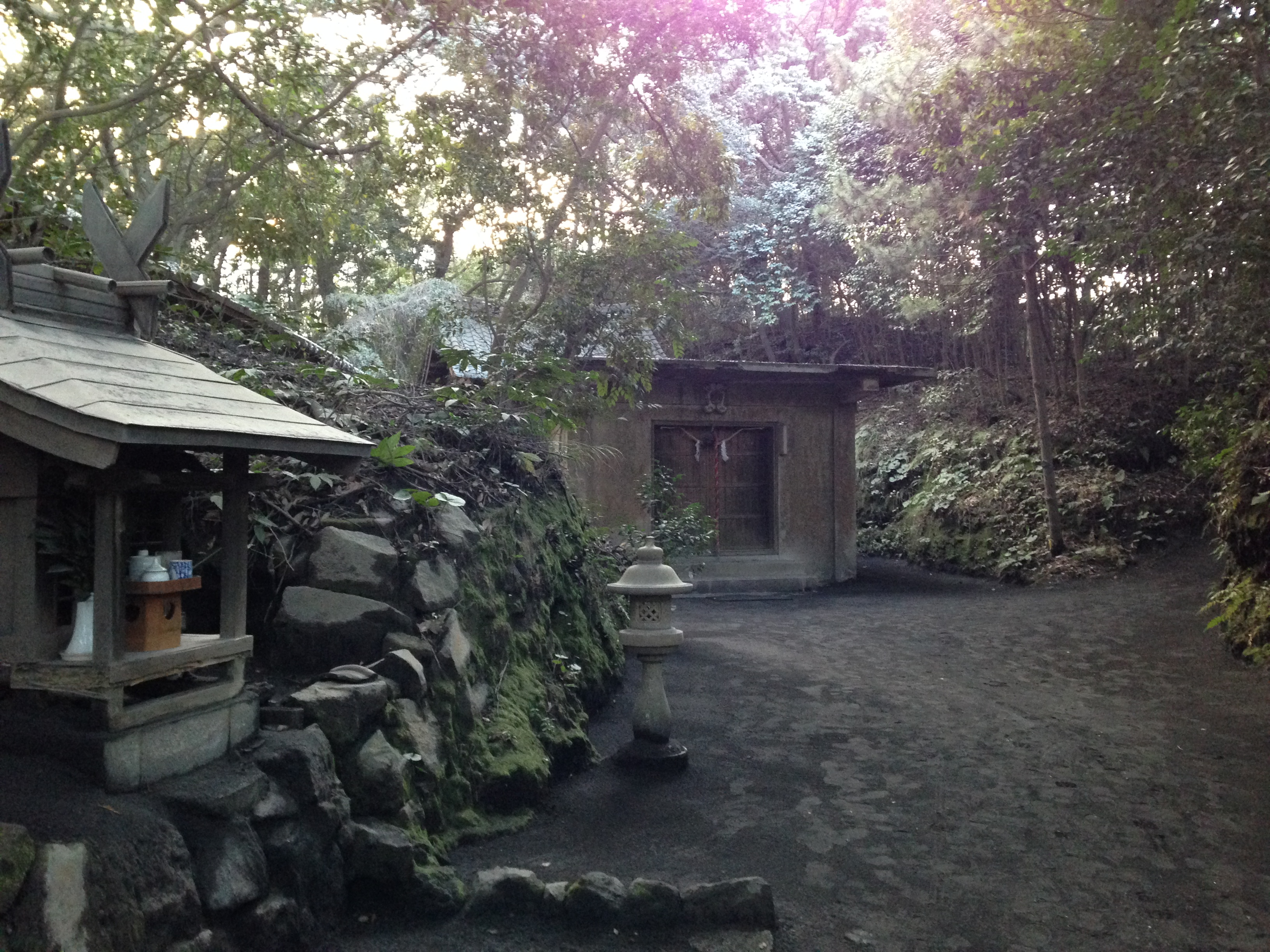 腹五社神社の本殿